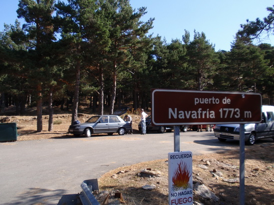 Puerto de Navafría. Indicador de altura.